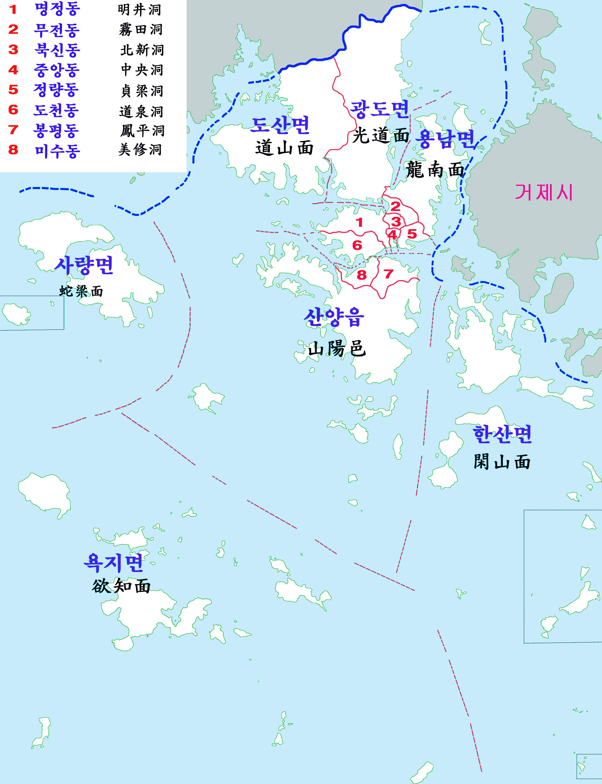 통영시 행정구역도